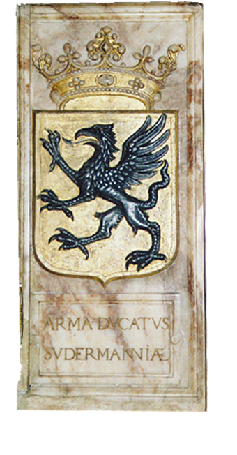 Södermanlands landskaps vapen vid Gustav vasas grav